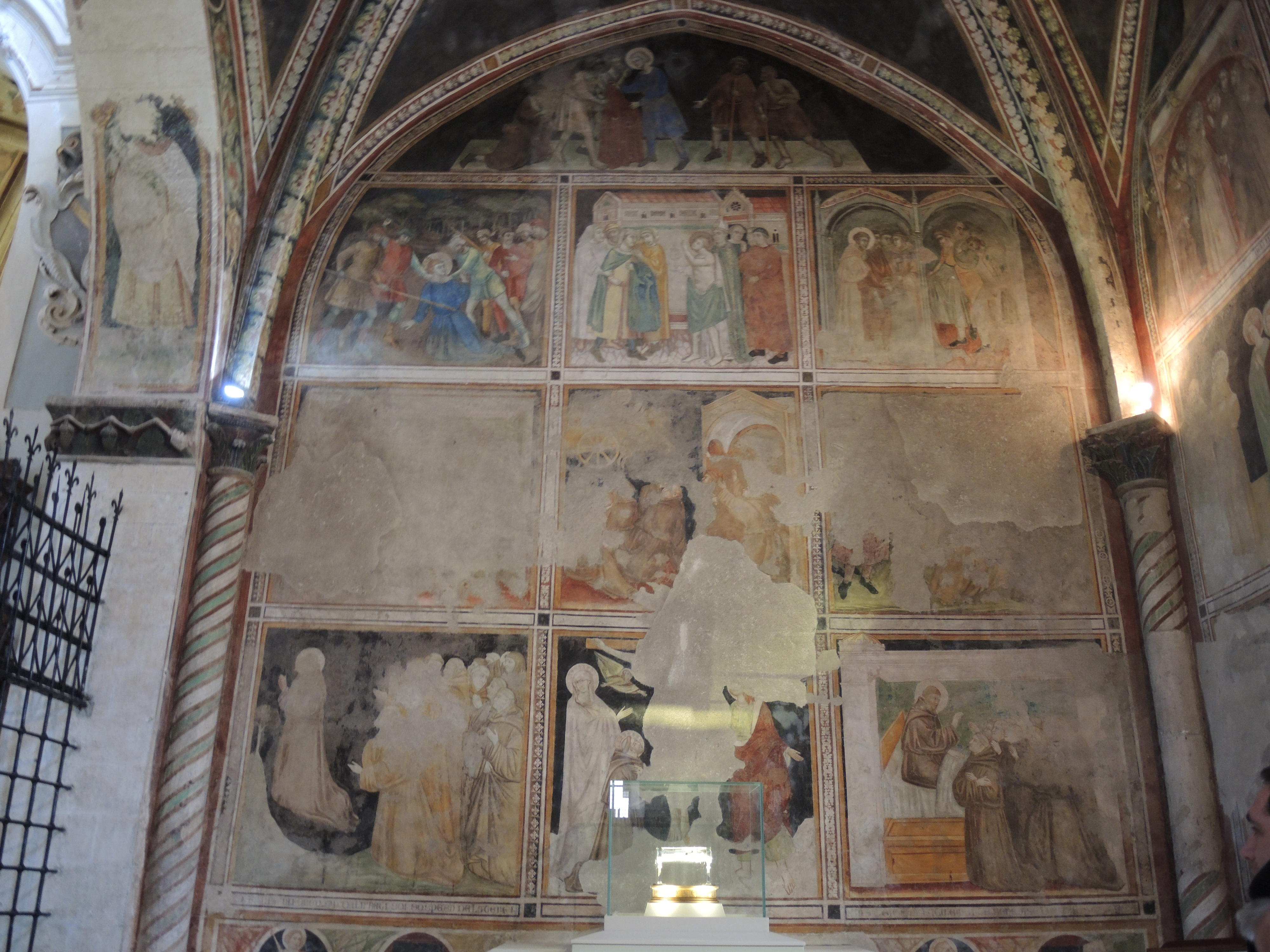 Castelvecchio Subequo: Chiesa di San Francesco